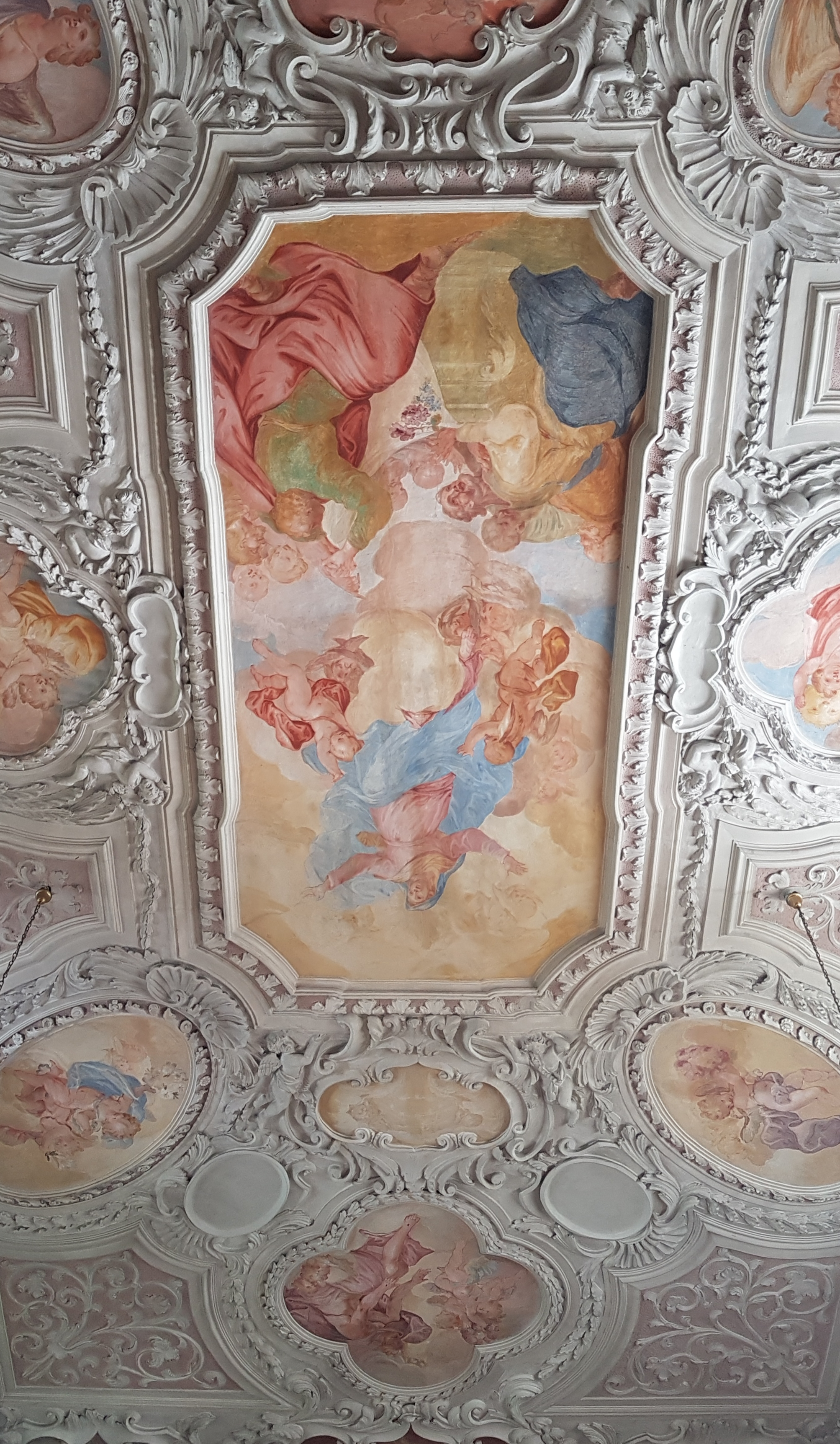 Wallfahrtskirche Maria Altenburg (Moosach), Fresken- und Stuckverzierung an der Langhaus-Decke